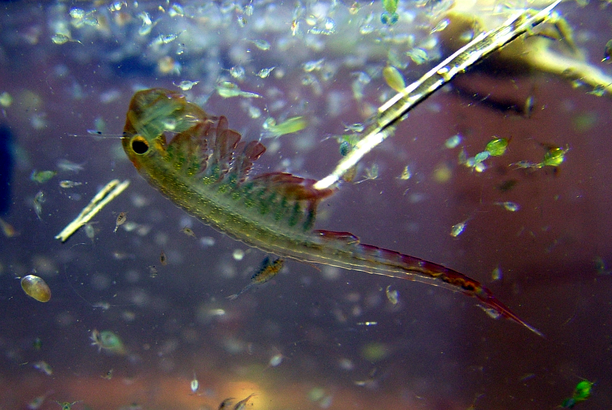 Eubranchipus grubii Katastr obce Klínec, odk. Praha - západ. Mokřad v louce 400 m východně od křižovatky silnic 1025 a 11512, 49°54'31.36" N 14°20'31.5" E